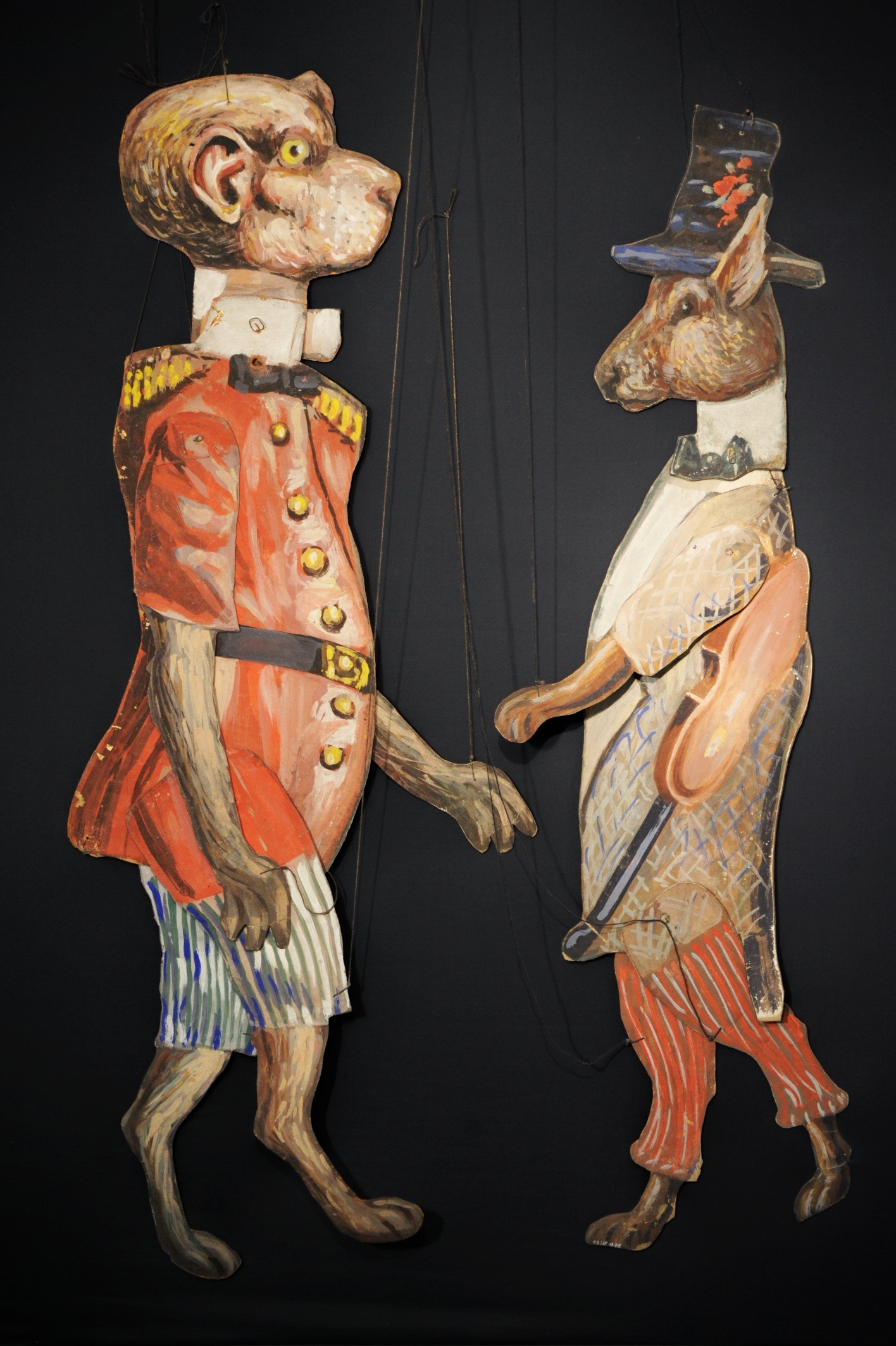 Tierballett, Flachfiguren Metamorphosen, um 1900, Dtld